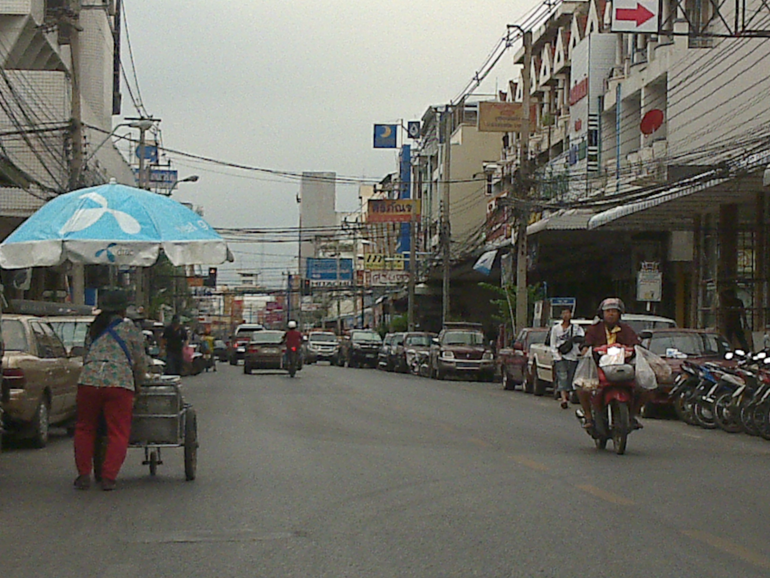 ถนนอัษฎางค์ นครราชสีมา